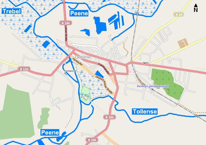 Stadtplan Demmin. Karte von openstreetmap.de, lizensiert nach Creative Commons Attribution Share Alike-Lizenz 2.0., permalink: Nordpfeil und Flußnamen hinzugefügt